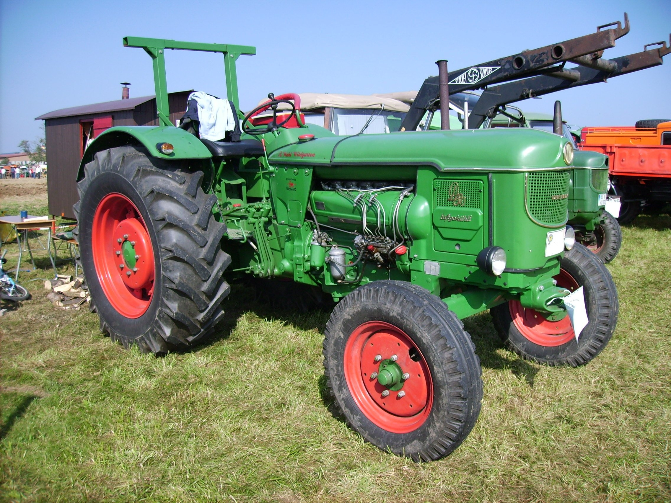 Deutz-Schlepper D 80; im Hintergrund ein Stockey-Schmitz-Frontlader